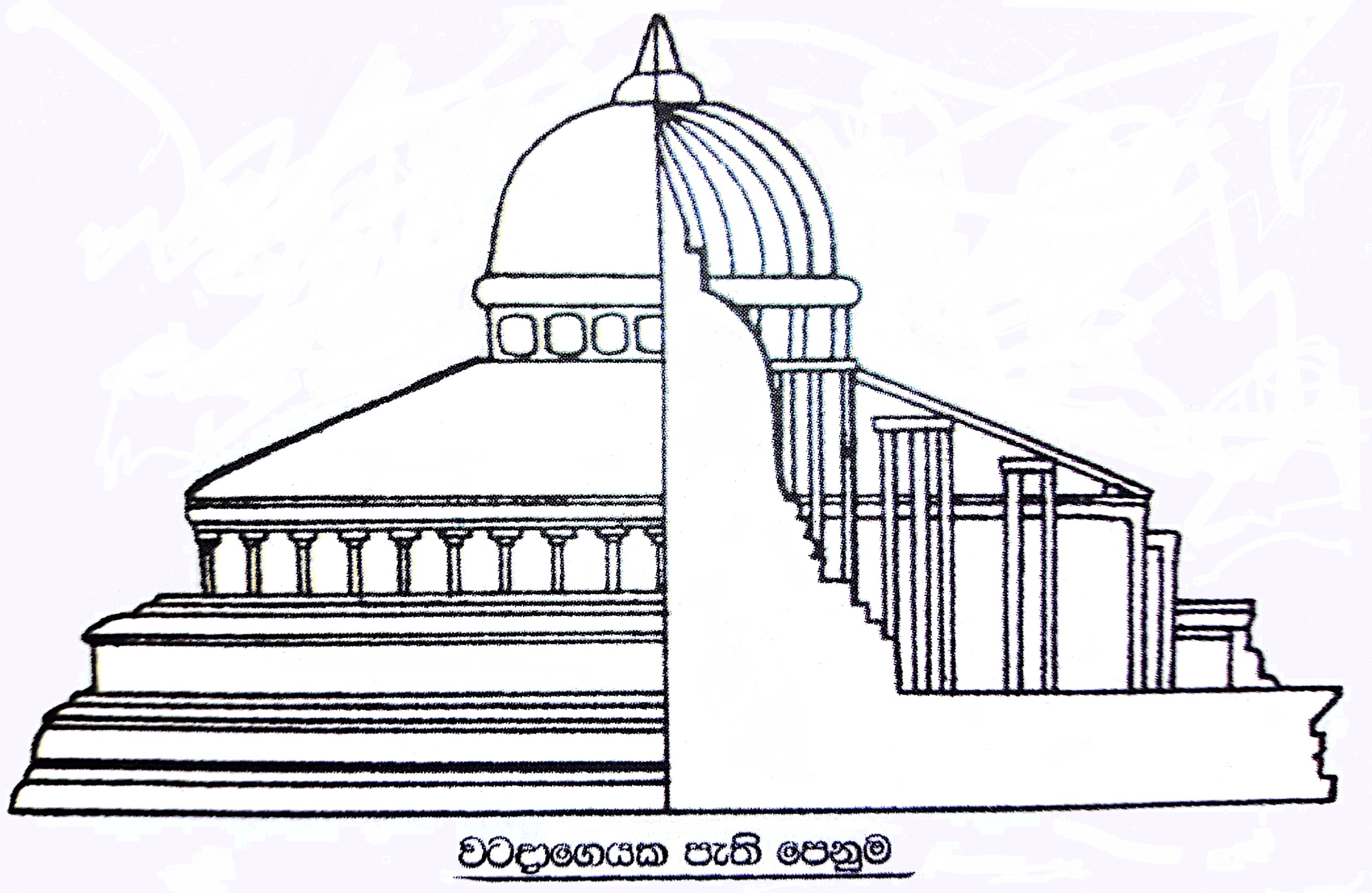 සිංහල: පොලාන්නරු වටදාගෙයි පැති පෙනුම